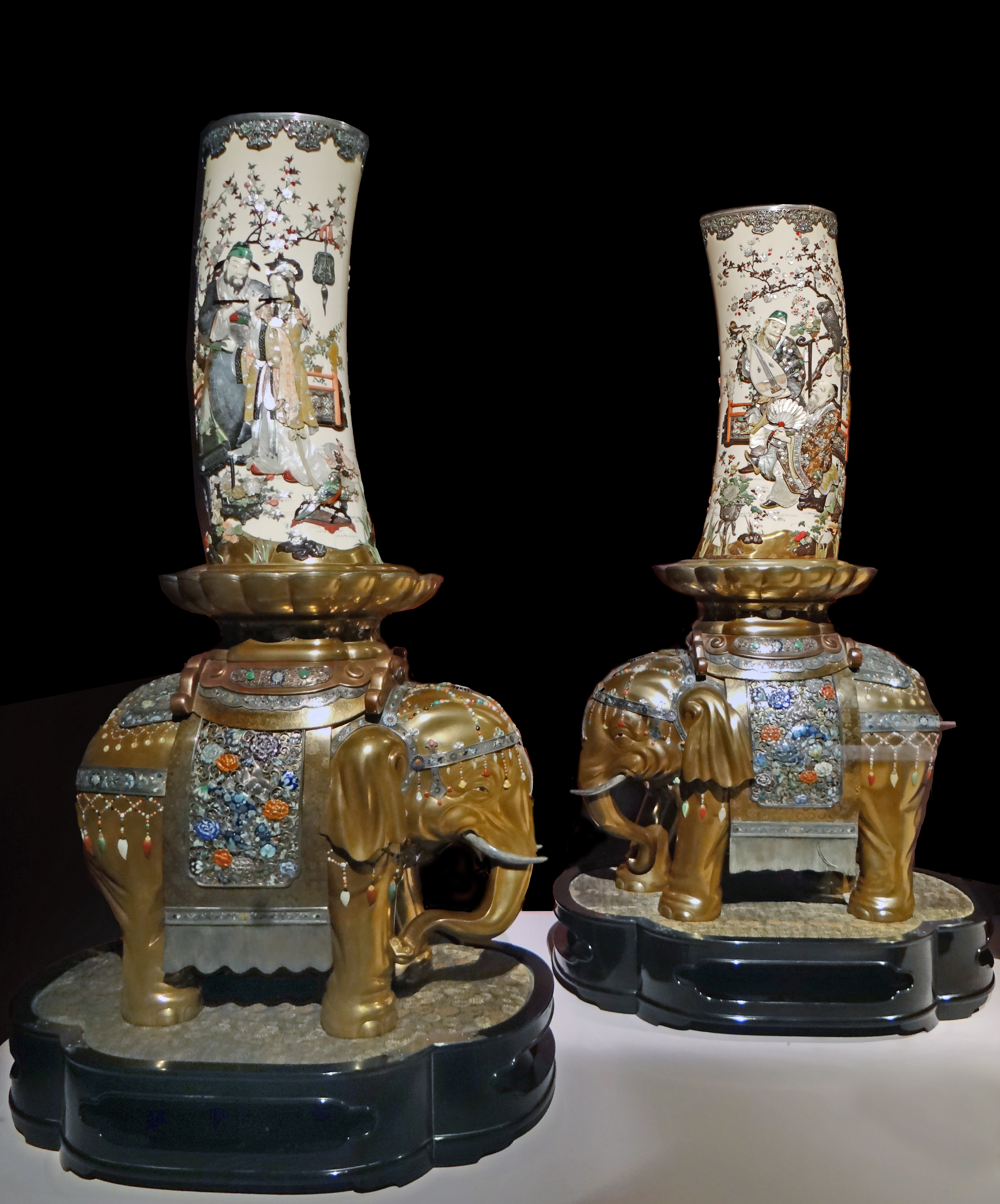 Pair of Tusk Vases / Deux vases avec défenses d'éléphants supportées par des éléphants L163 Japon, vers 1885 Auteurs : Kaneko (?), Hiratsu Mohei (?),.. émaux cloisonnés, ivoire, argent, bois, laque.. Collection Khalili, Londres Notice des vases dans la base de données de la collection Khalili, Londres Vases présentés dans l'exposition Meiji au musée national des arts asiatiques Guimet Photo Annie Dalbéra